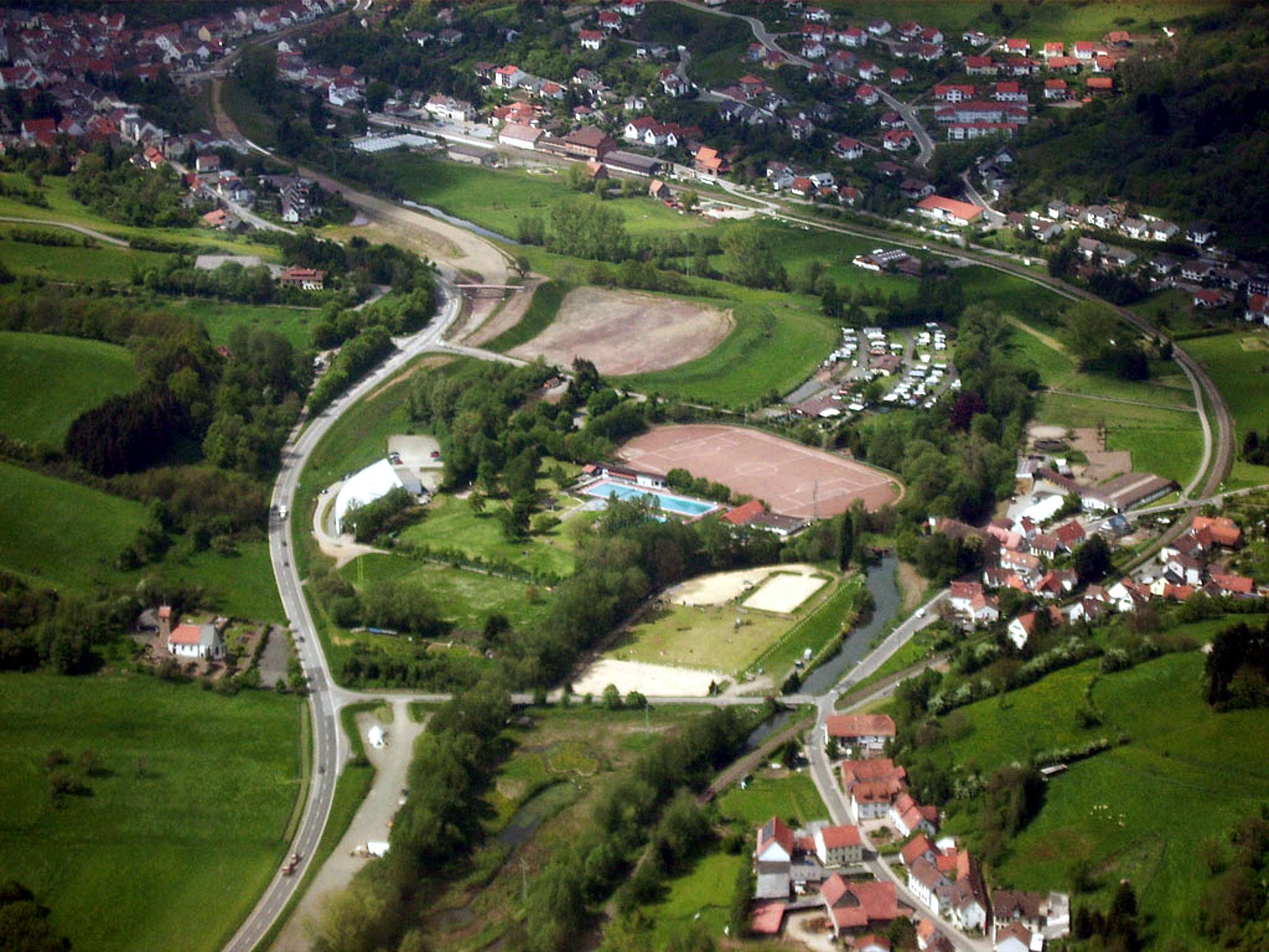 Wolfstein teilweise aus der Luft. Blick auf den Sportplatz (Bildmitte), Gelände des neuen Rasenplatzes (darüber), Campingplatz, Warmfreibad, Sport- und Freizeitcenter, Volleyballplatz sowie Reitplatz. Links im Bild die Zweikirche zu Rutsweiler. Rechts unten Roßbach, am oberen Bildrand die Stadt Wolfstein.